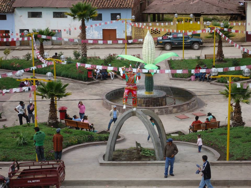 Hermosa vista de la Plaza de Huancaray.